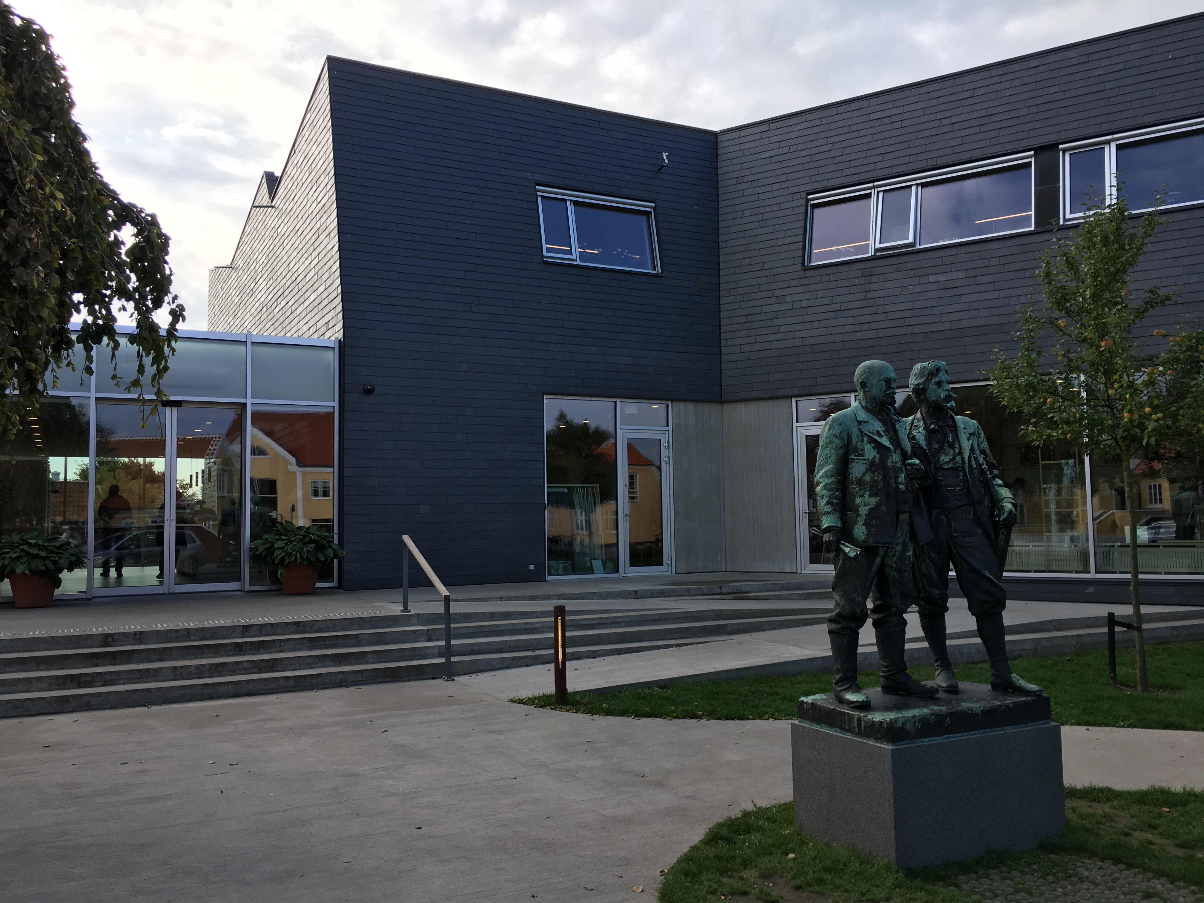 Indgangen til museet